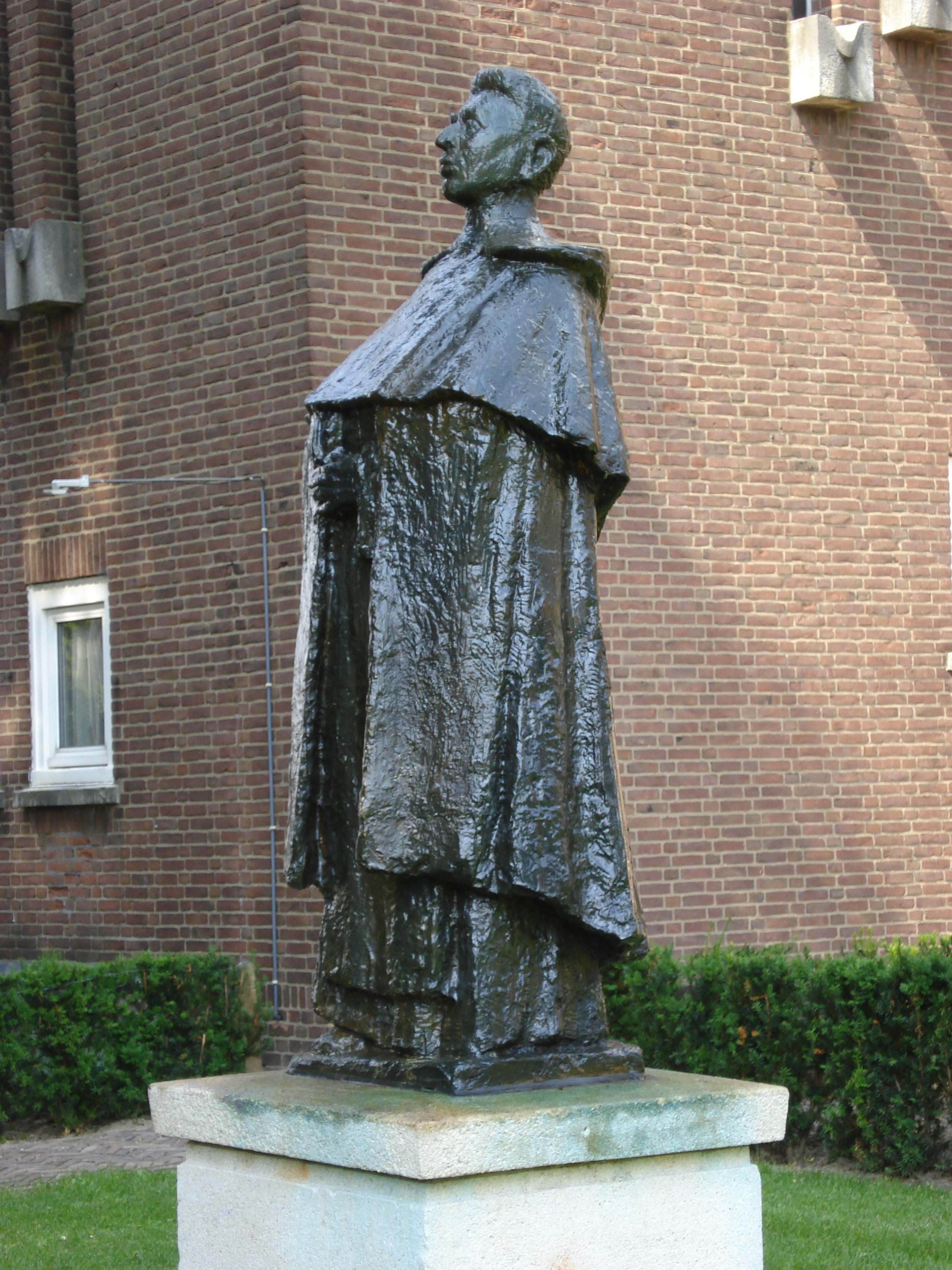 Oss, statue Titus Brandsma devant le lycéeFrysk: Oss, stânbyld fan Titus Brandsma foar it Titus Brandsmalyseum